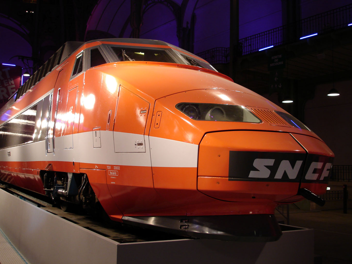 Motrice de la rame 16 du TGV Sud-Est, détentrice du record mondial de vitesse du 26 février 1981 à 380km/h Nef du Grand Palais à Paris, France Décembre 2007 Photo personnelle (own work) de Clicsouris